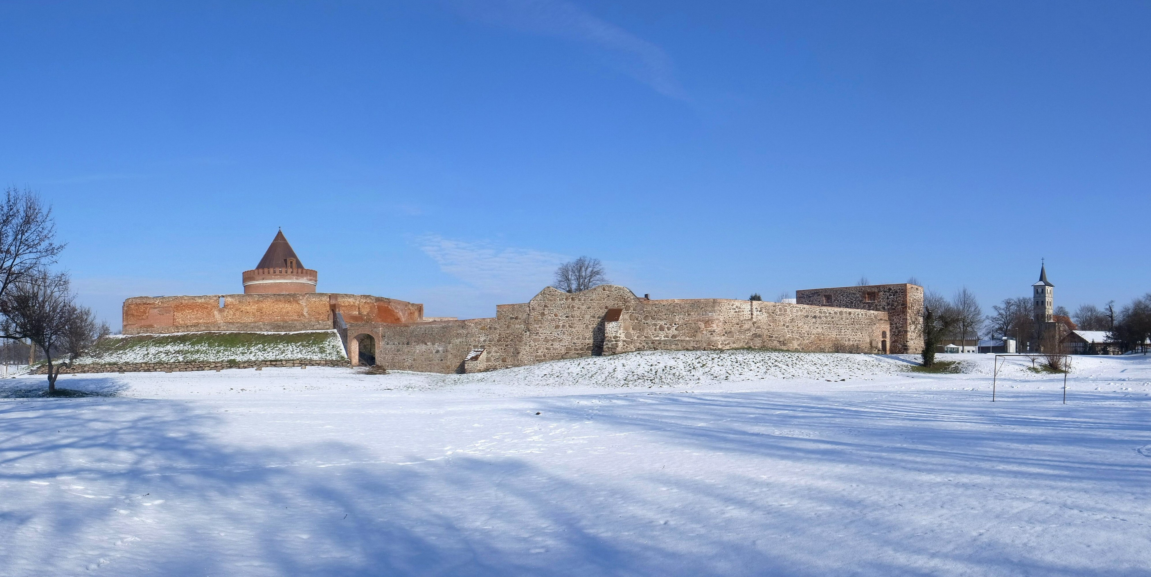 Ruine der Burg Lindau bei Zerbst (Anhalt) im Landkreis Anhalt-Bitterfeld